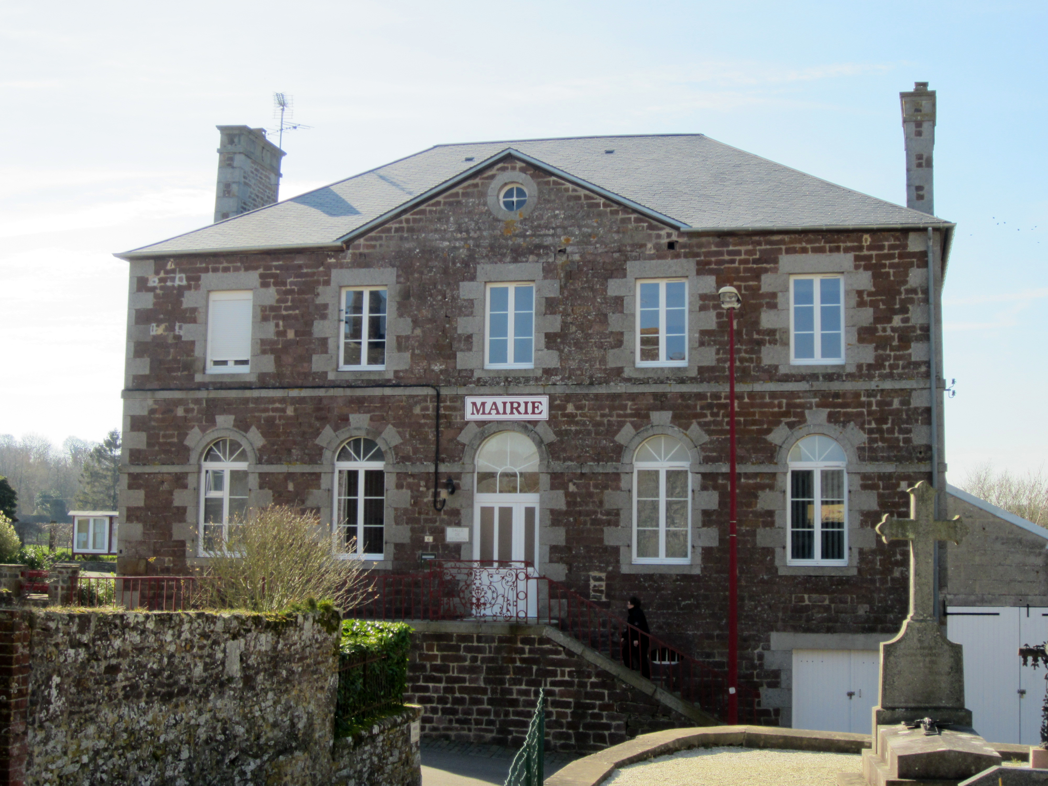 Ver, Manche